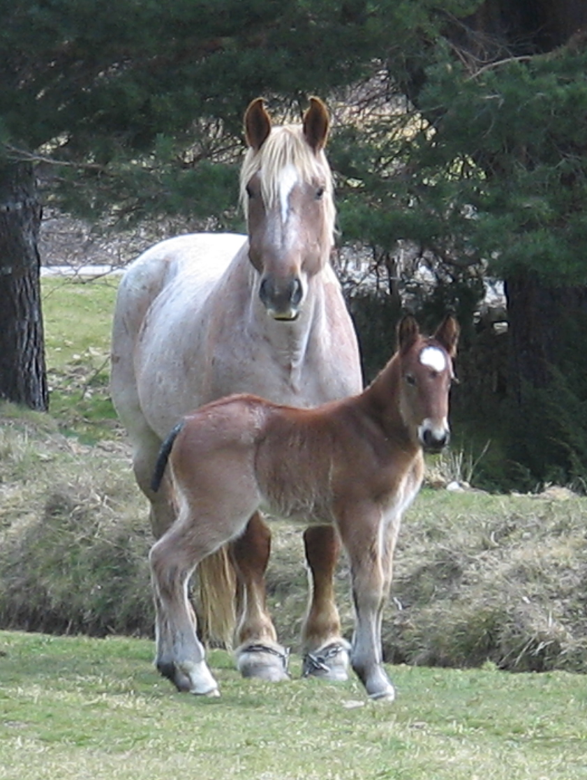 Caballos en la Sierra de Gredos (Ávila, España).